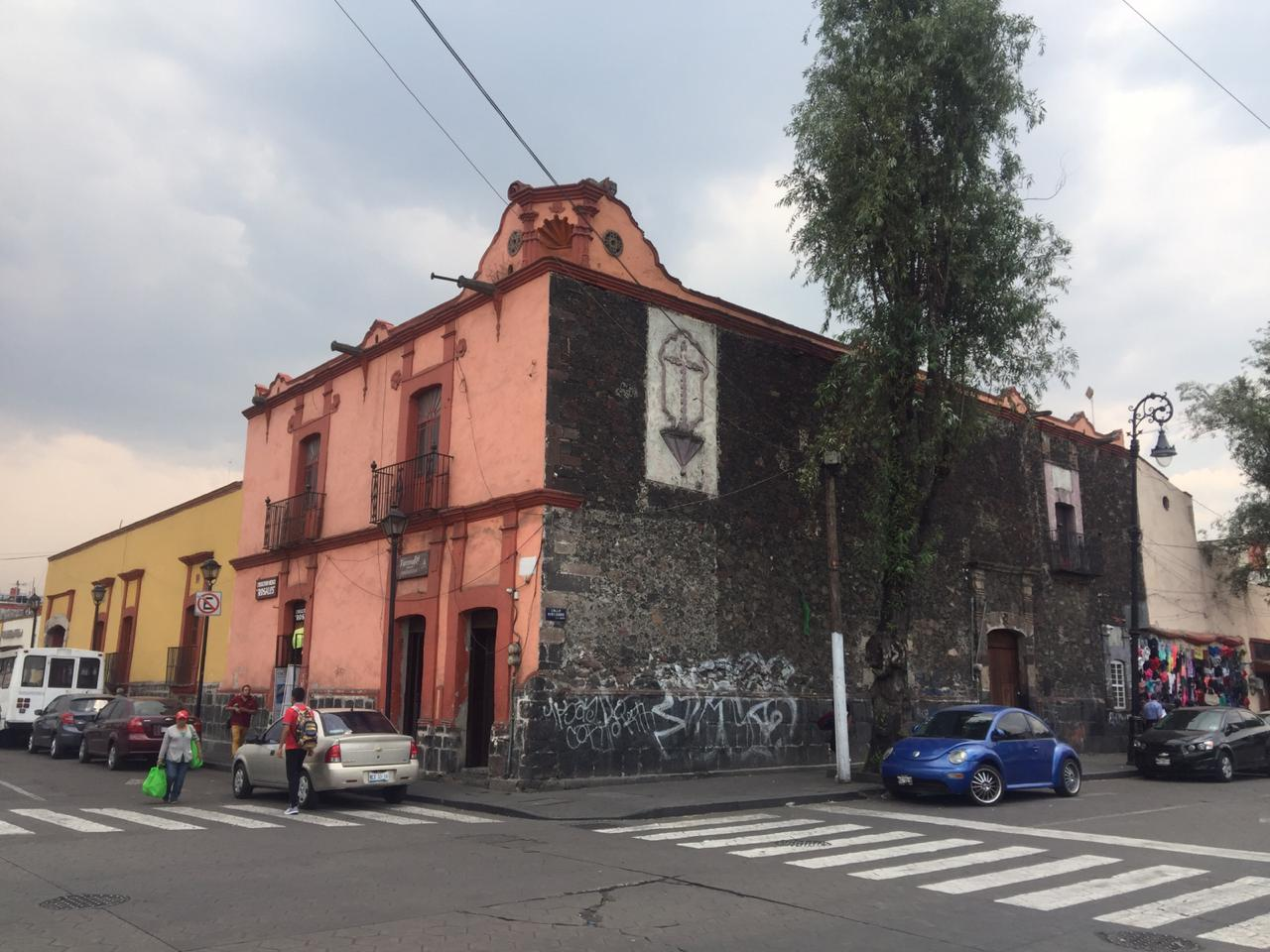 Casa del cacique Apochquiyahuatzin en el centro de Xochimilco, construida en el siglo XVI